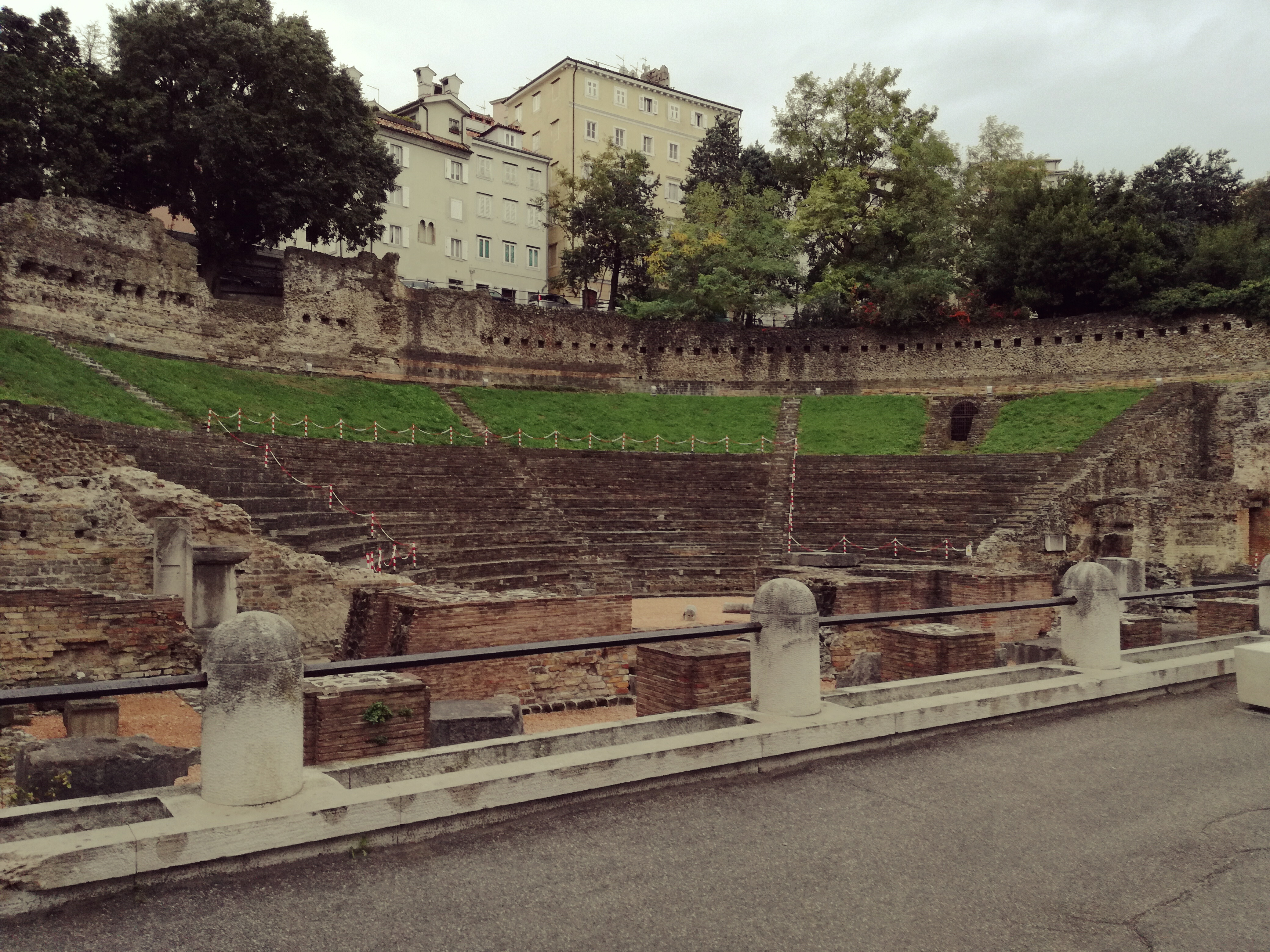 teatro romano di Trieste - vista frontale This is a photo of a monument which is part of cultural heritage of Italy.